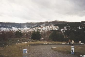 Kruševo